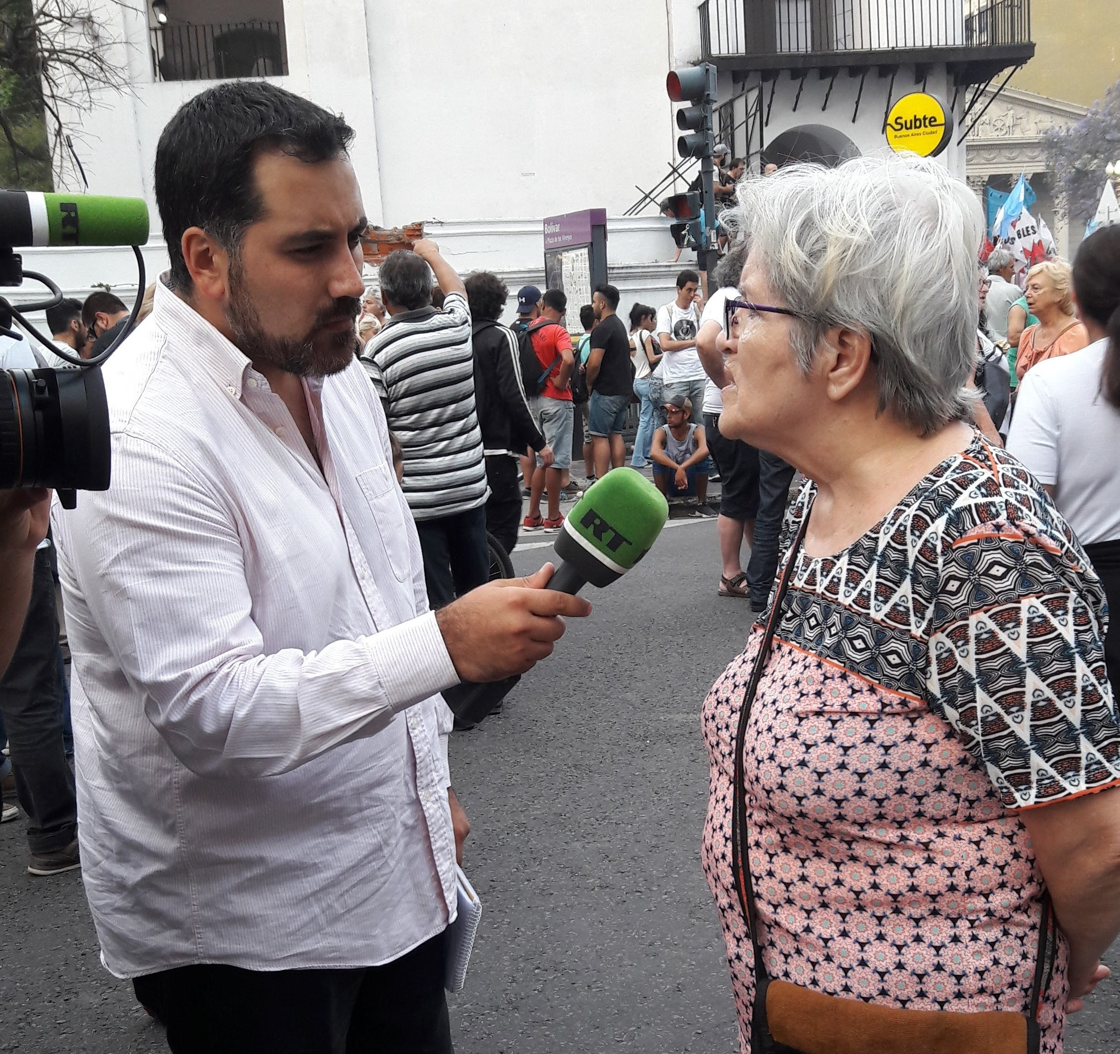 Corresponsal de RT en Español en Buenos Aires, Argentina, cubriendo la Marcha de la Resistencia de 2017.